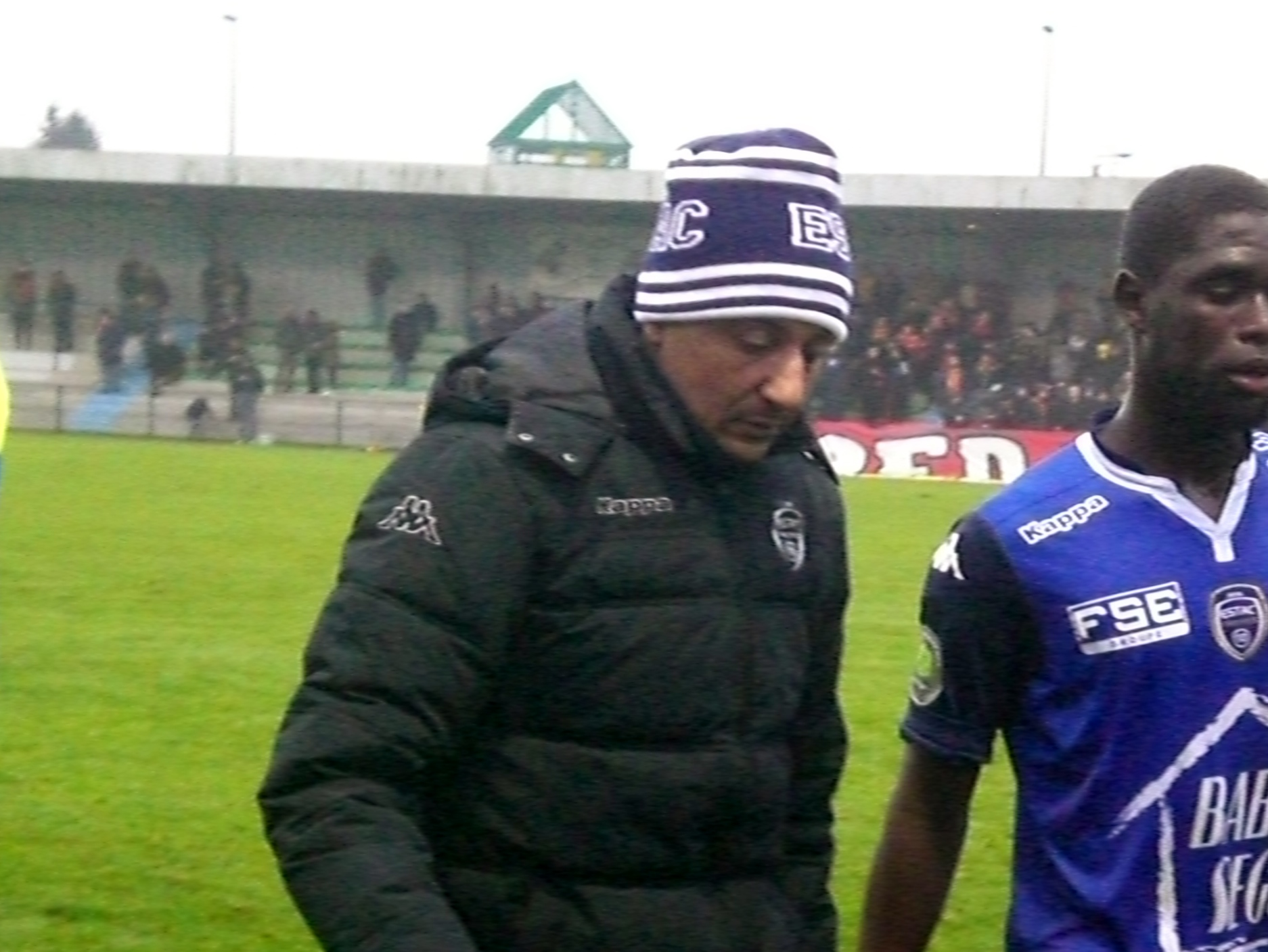 Gharib Amzine lors du match RC Lens B / ES Troyes B, comptant pour la dix-huitième journée du Championnat de France de football amateur (CFA), le13 février 2016, au Stade François Blin d'Avion.